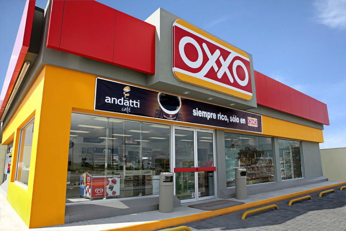 ein OXXO-Laden in den typischen Firmenfarben.